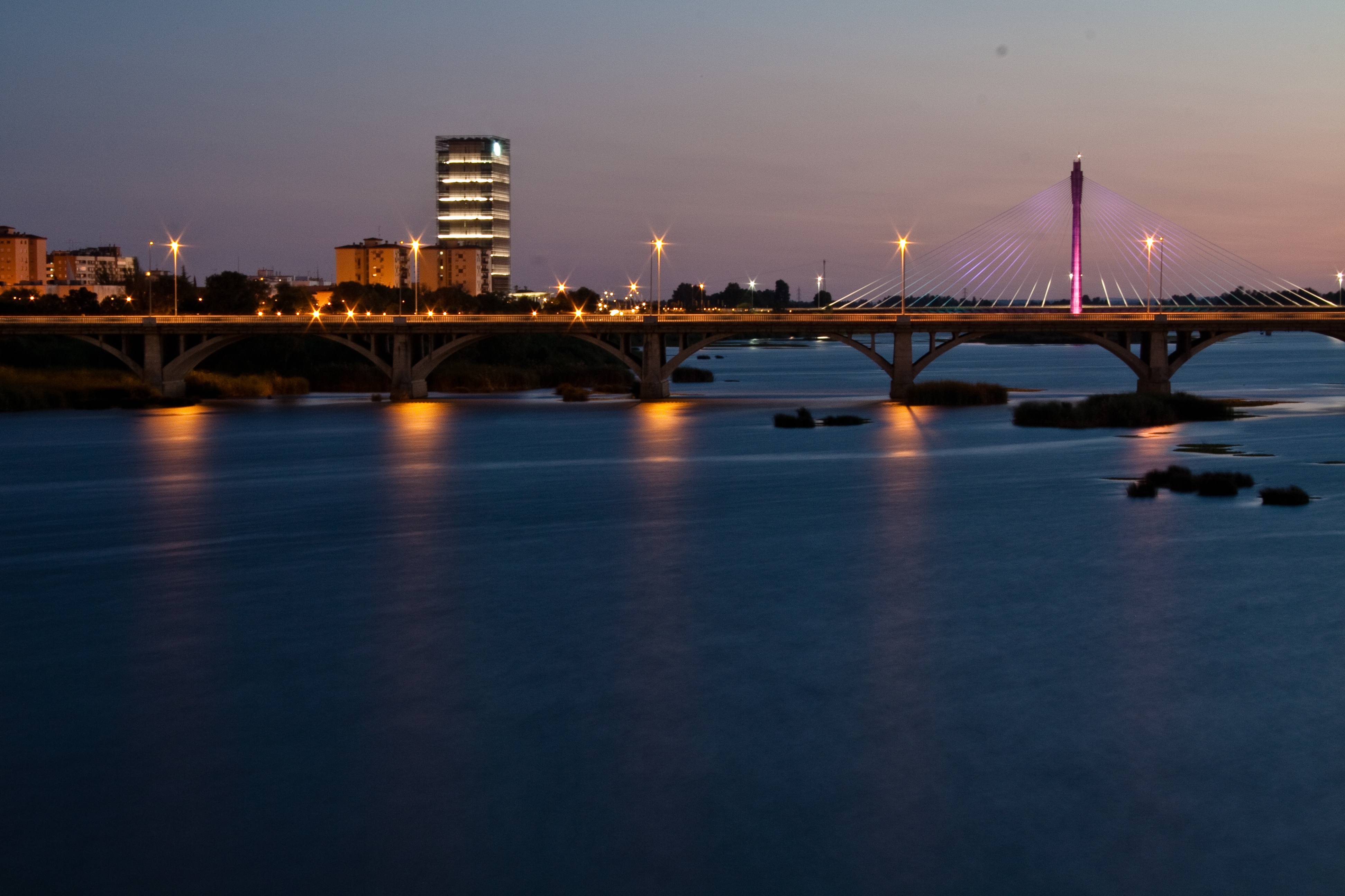 Río Guadiana. Puente Real y Puente de la Universidad. Edificio de Caja Badajoz.